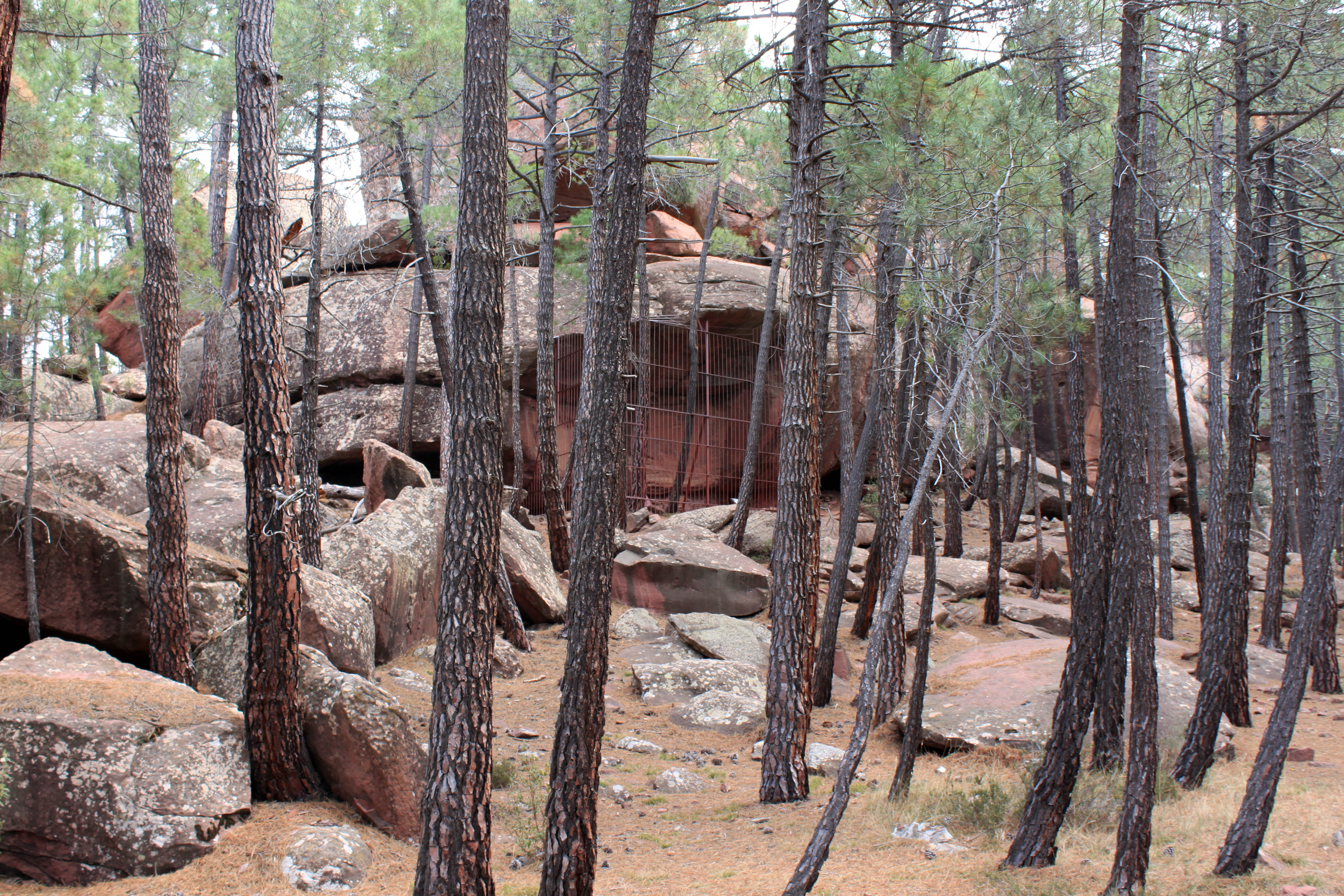 Abrigo del Arquero de los callejones cerrados situado en la Sierra del Rodeno en el término municipal de Albarracín, Teruel, España.